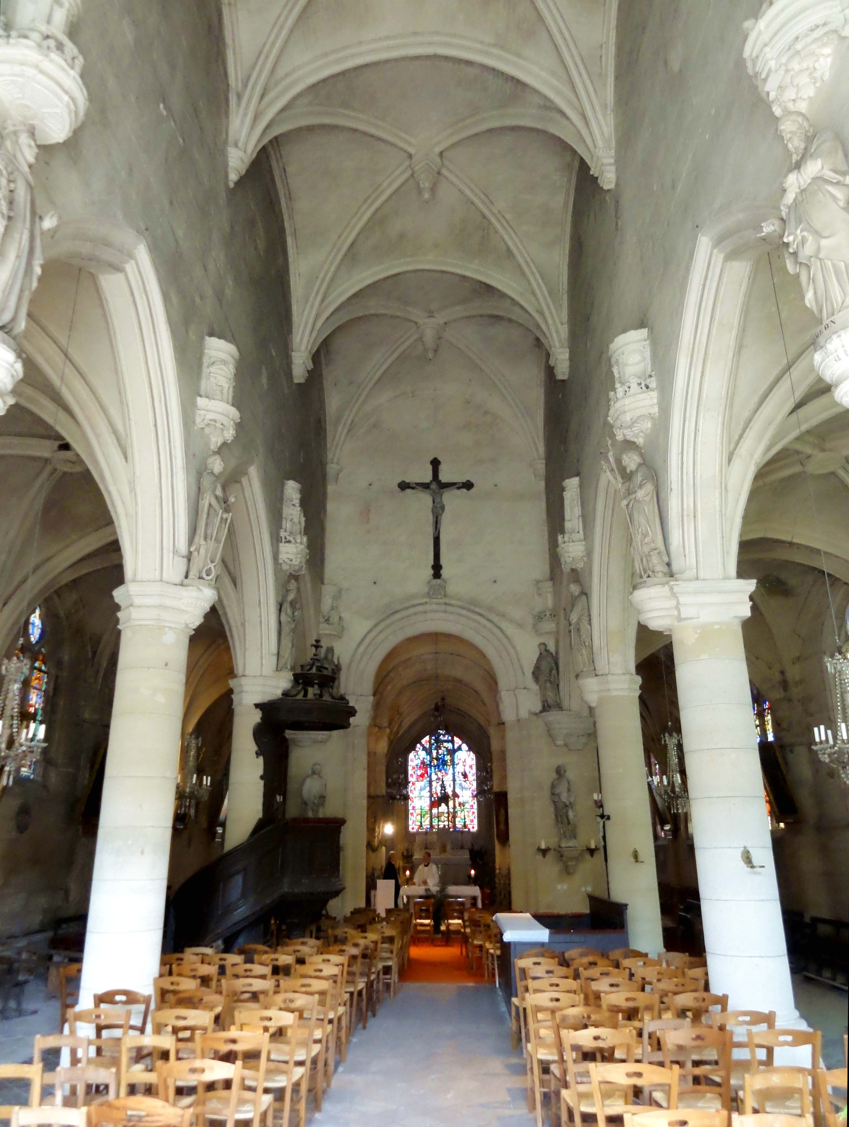 Intérieur de l'église (voir titre).